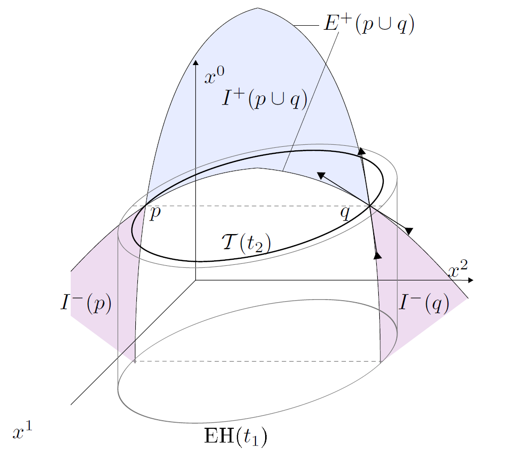 Raumzeitdiagramm einer gefangenen Fläche innerhalb eines Ereignishorizontes. Für eine Ebene x1 = konstant sind Horismos, Zukunft und Vergangenheit zu den jeweiligen Schnittpunkten (p und q) dieser Ebene mit der gefangenen Fläche eingezeichnet.